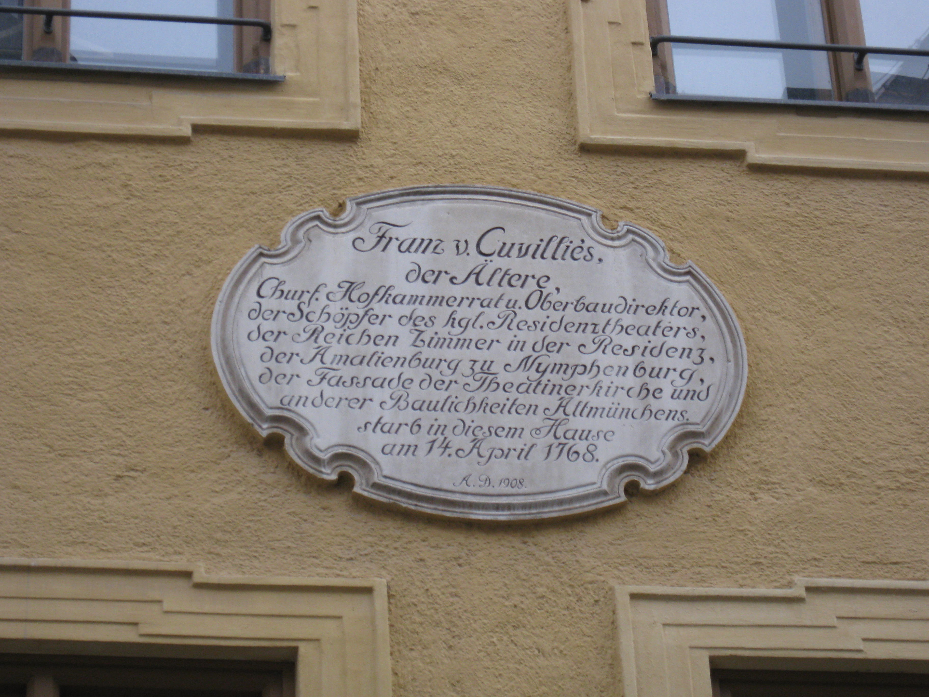 Gedenktafel für Franz von Cuvllliés, München Innenstadt, Burgstr.8